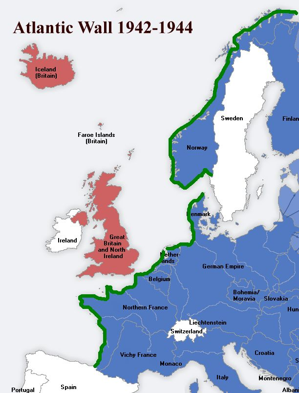 החומה האטלנטית